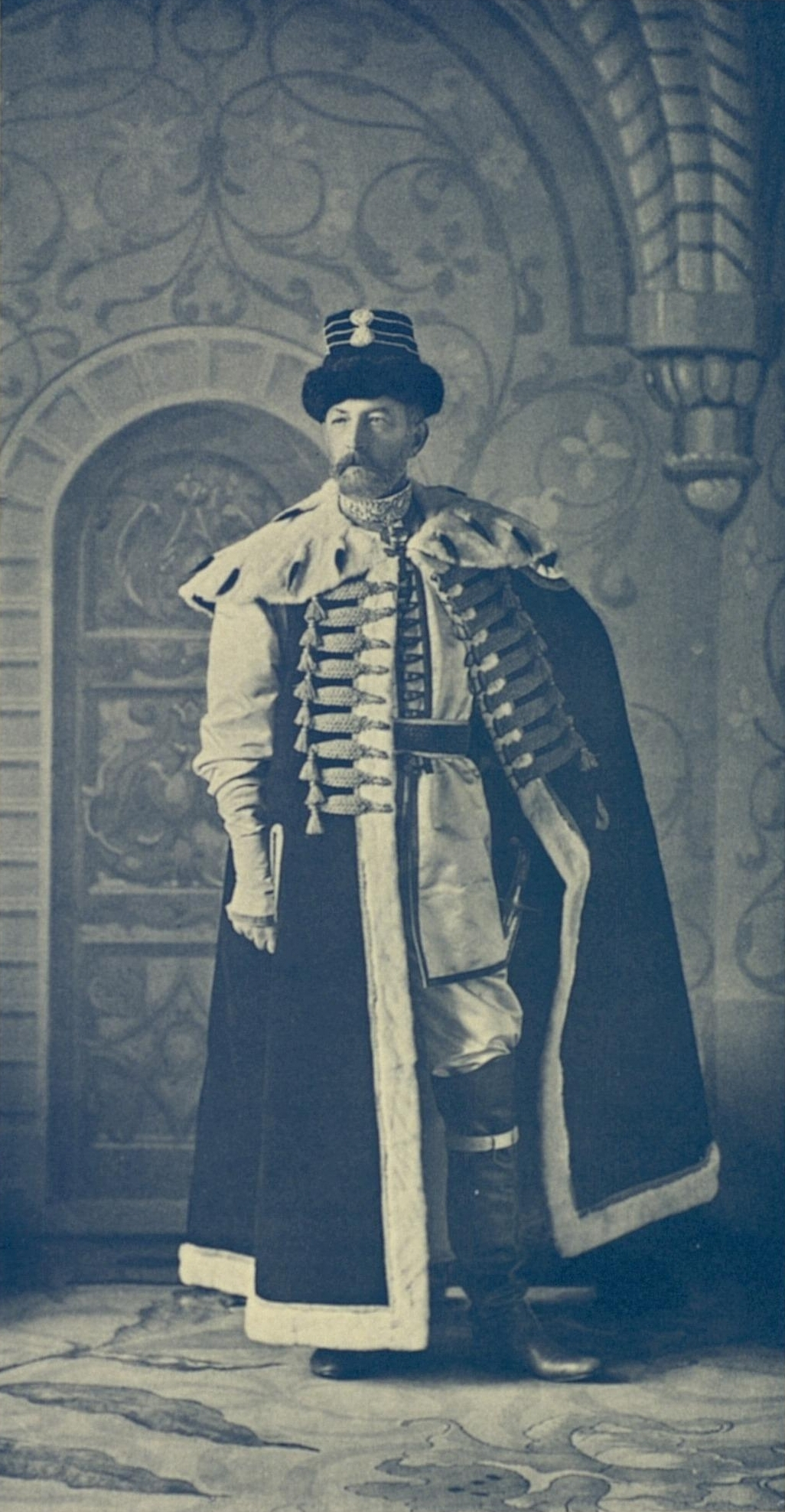 Гофмаршал Граф Павел Константинович Бенкендорф, в наряде Стольника Князя Репнина.